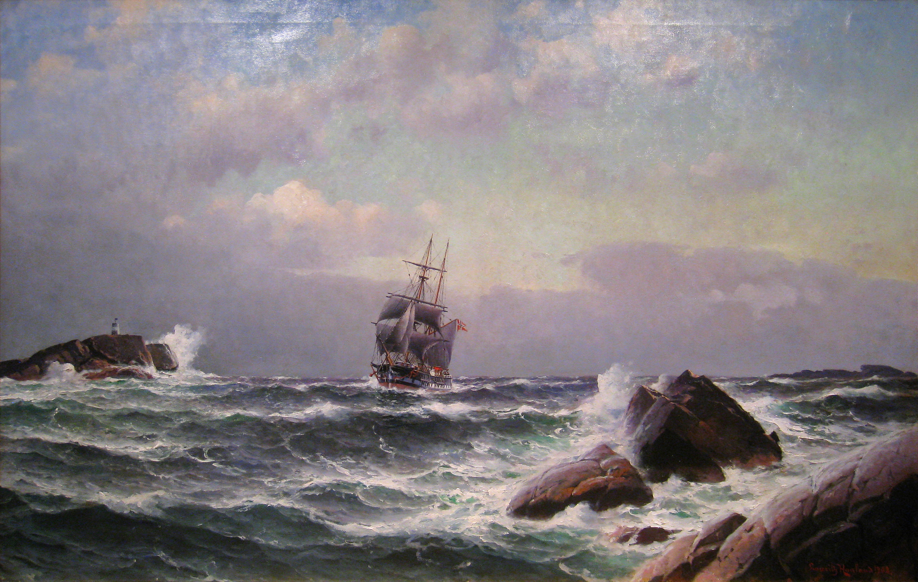 Skip Langs Kysten